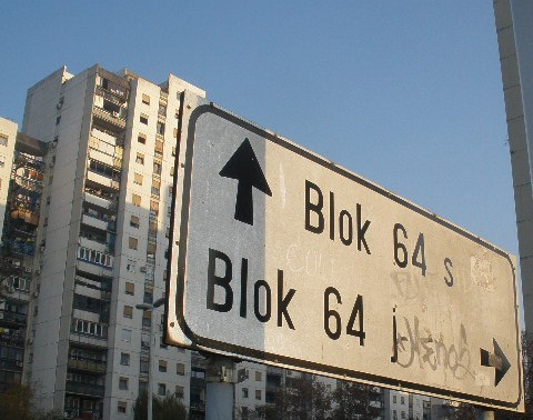 Znak u Bloku 64 za Sever i za Jug